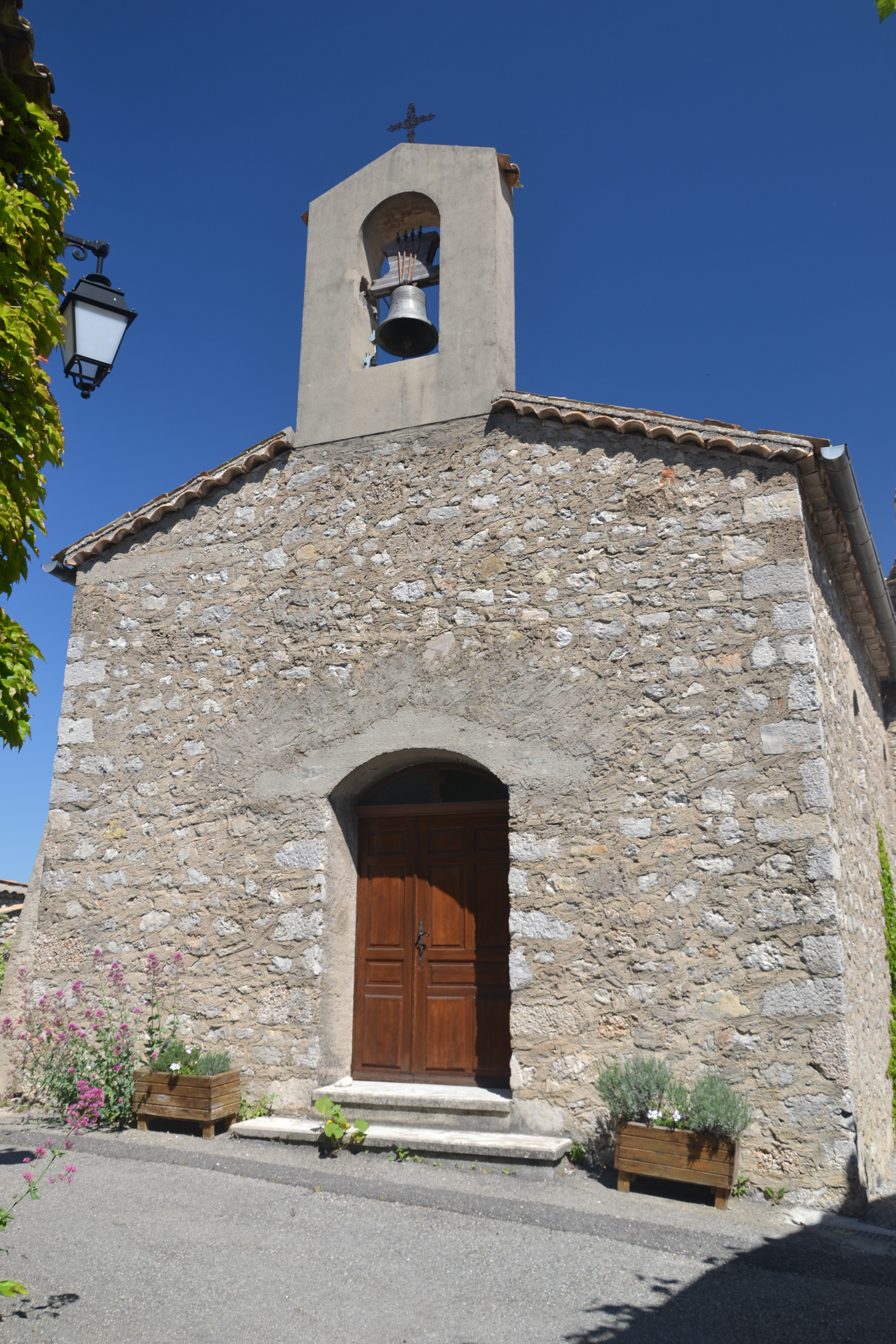 église de Montréal les Sources